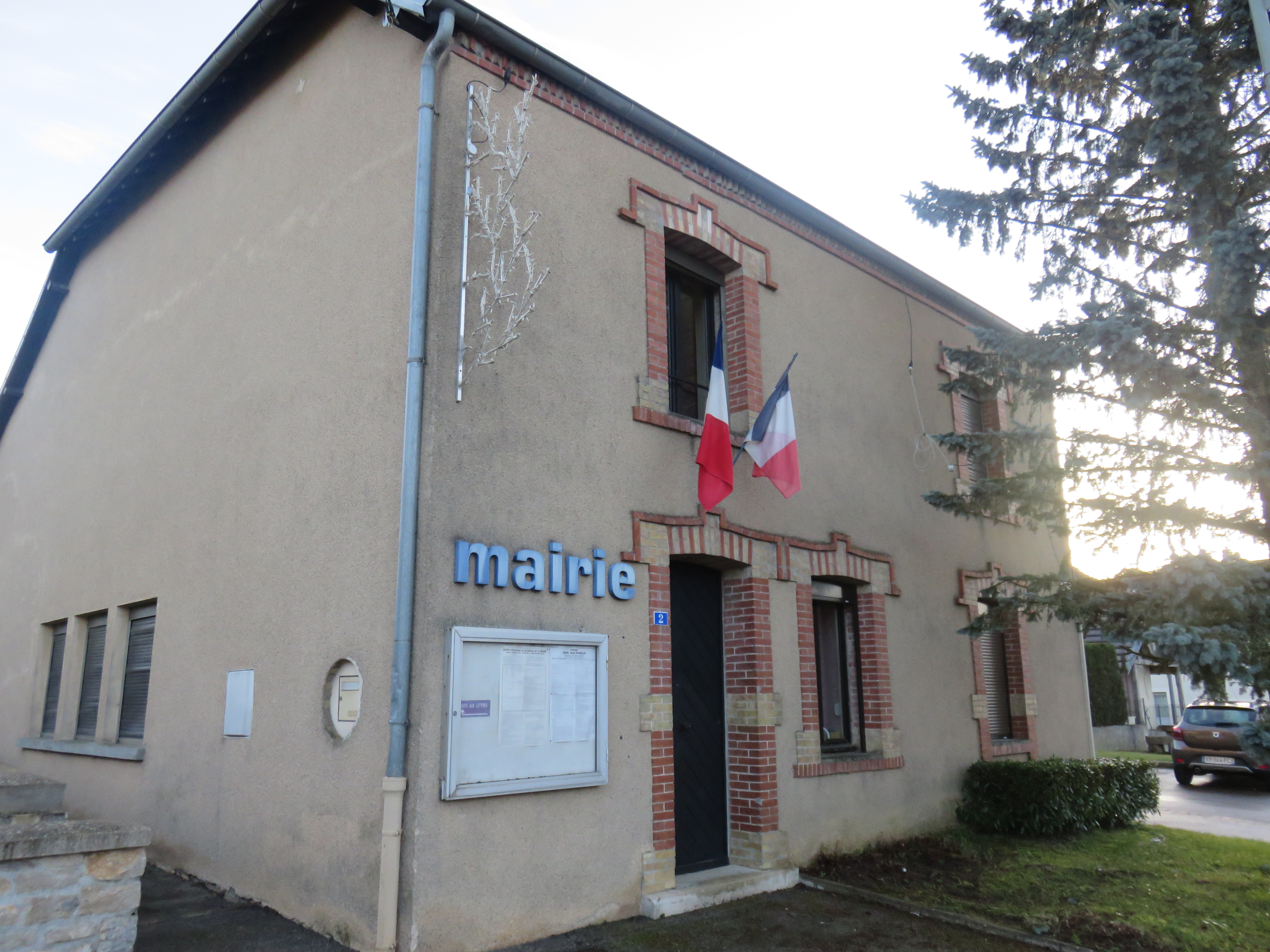 Rans (Jura, France) en janvier 2018.